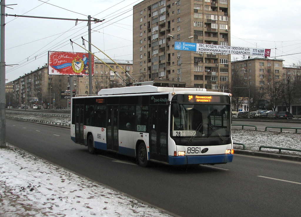 Троллейбус ВМЗ-5298.01, Москва, проспект Вернадского